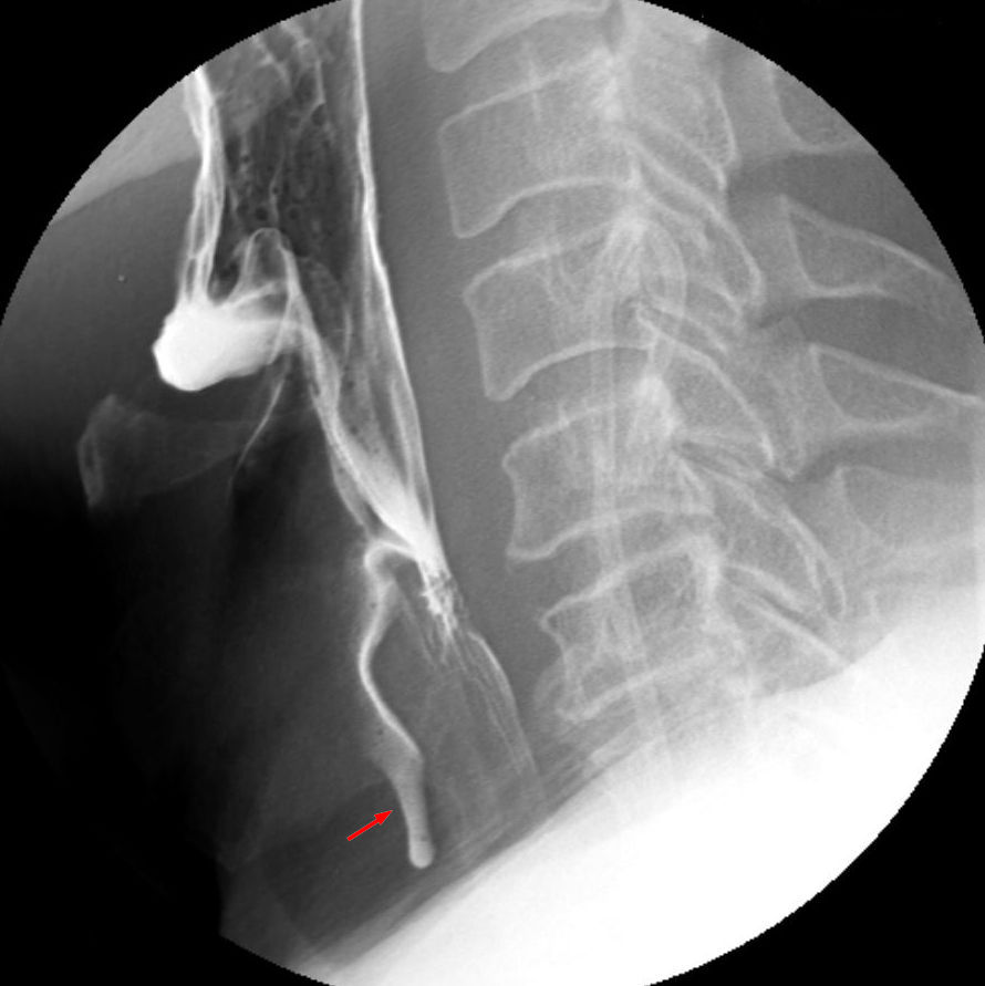 Postdeglutitive Aspiration in der Röntgenschluckuntersuchung. Nach dem Schluckakt (Larynx und Epiglottis wieder in Ruhestellung) kommt es zum Überlaufen von retinierten Bolusanteilen aus dem Hypopharynx nach vorne in den Larynx und tiefer nach subglottisch, damit Aspiration.